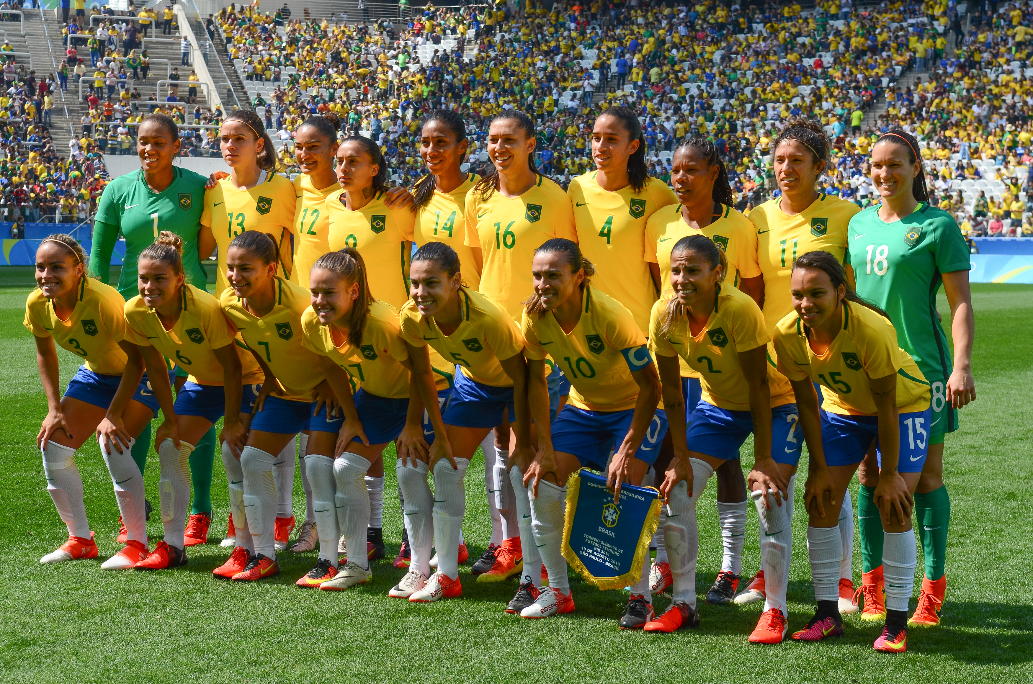 São Paulo - Canadá vence o Brasil por 2 a 1 e fica com a medalha de bronze no futebol feminino dos Jogos Olímpicos, na Arena Corinthians (Rovena Rosa/Agência Brasil)